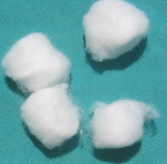 cotton balls